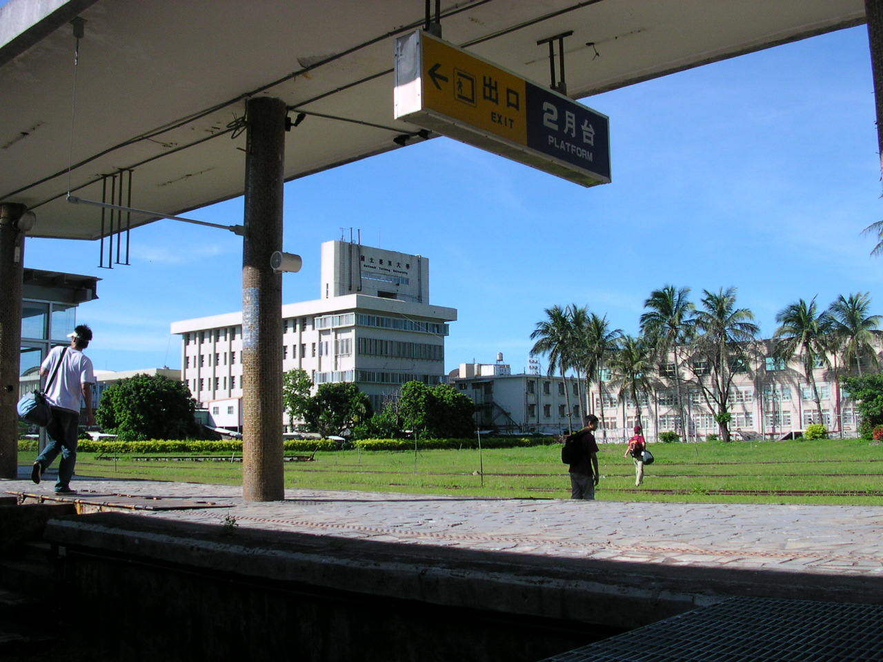 臺灣鐵路管理局臺東舊站第二月臺與國立臺東大學。